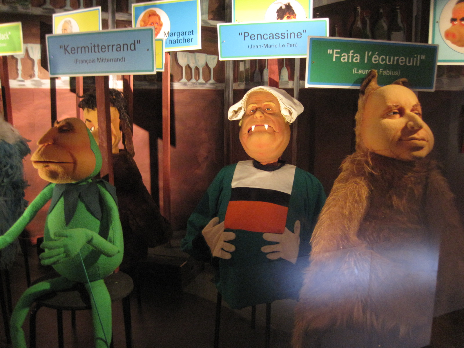 Le Bébête show - Exposition de marionnettes de la citadelle de Besançon